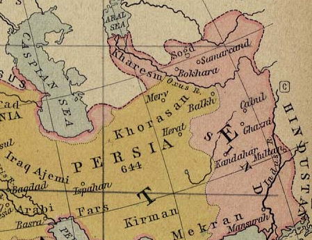 تبرستان در زمان داعی کبیر